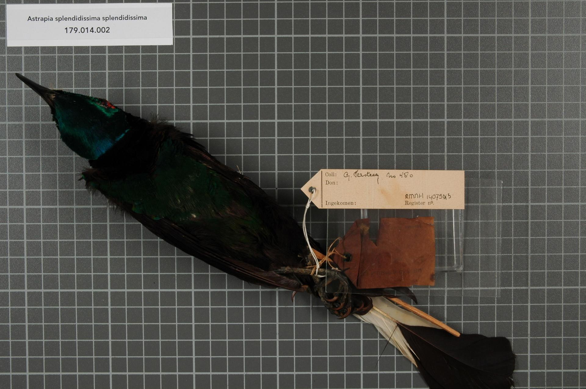 Astrapia splendidissima splendidissima Rothschild, 1895